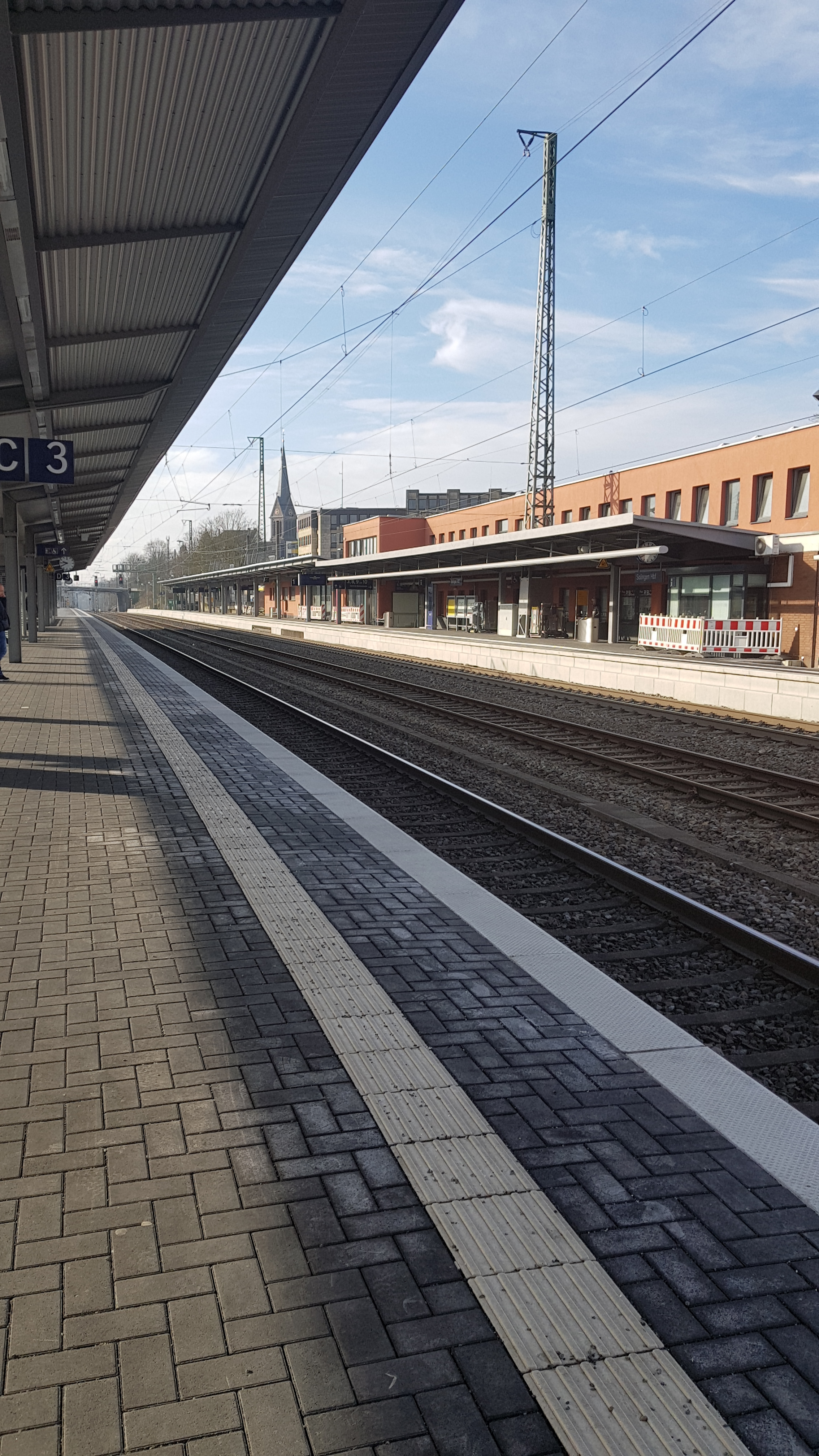 Gleis 1 und 3 nach der Modernisierung